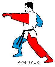 Techniky karate, různostraný úder, gjaku-cuki